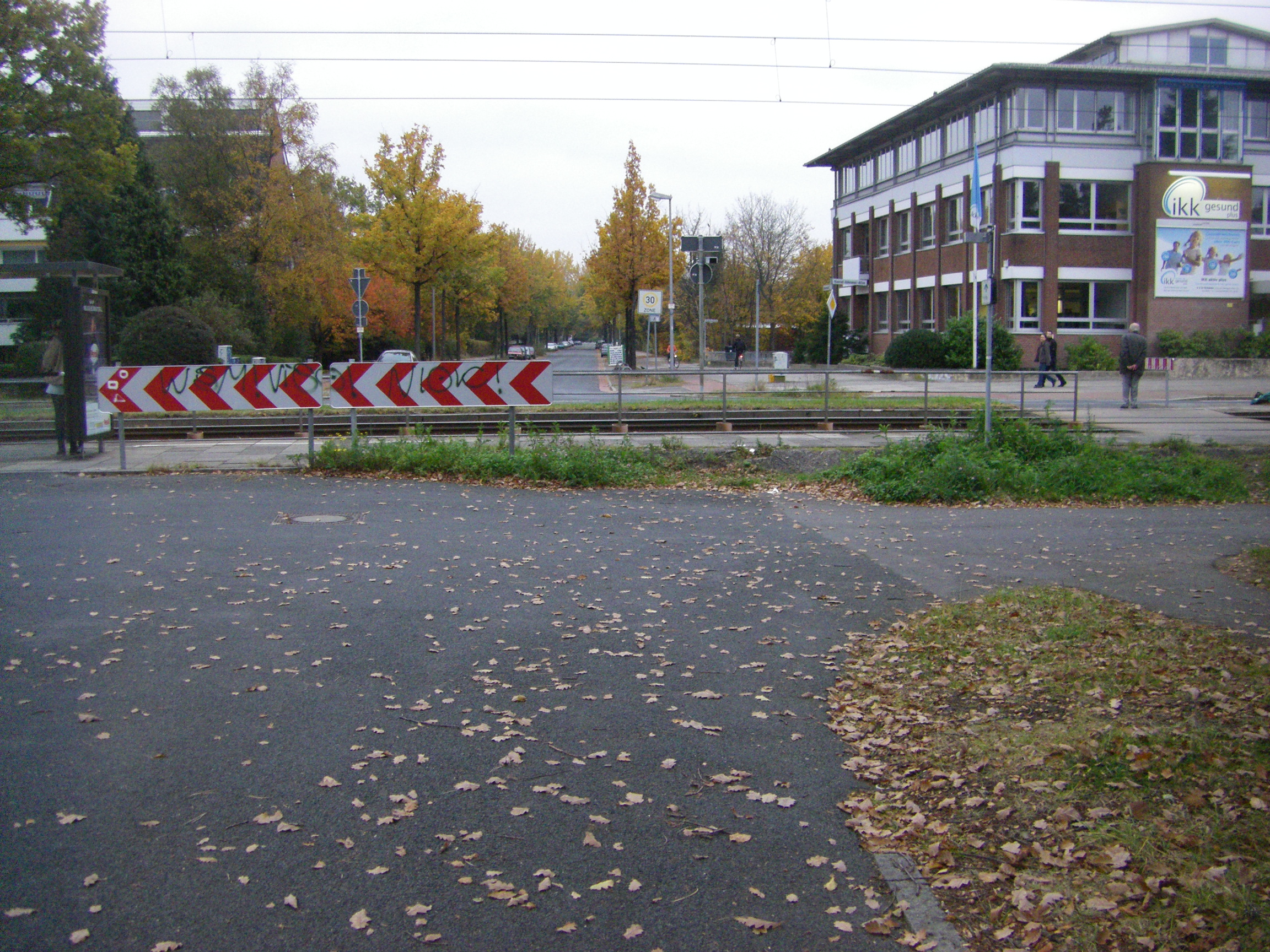 Vergleichsbild von 2011 zu "Barbarossastraße Ecke Hindenburgallee 1965.jpg", vom selben Kamerastandpunkt aufgenommen.